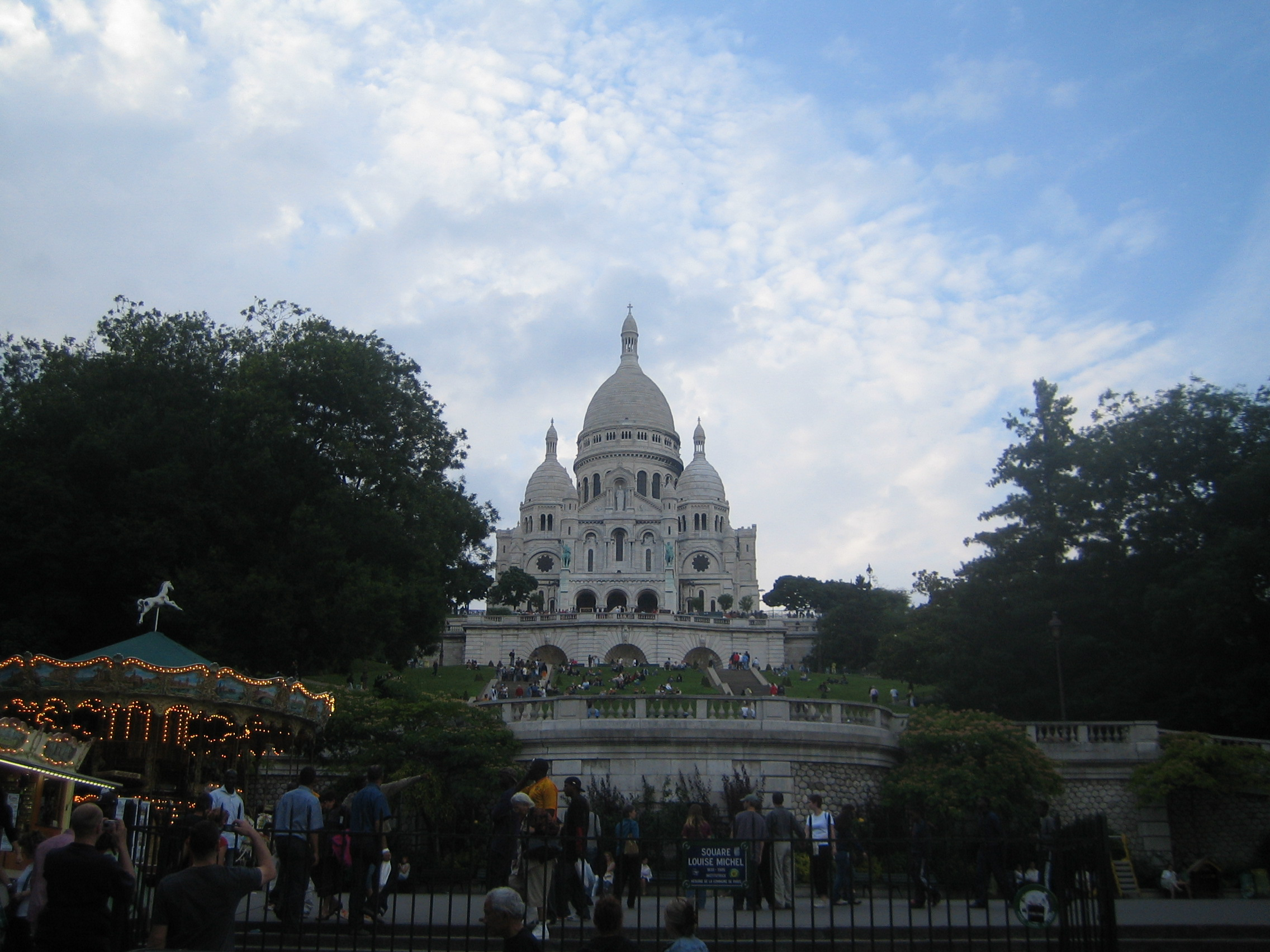 Square Louise Michel et Sacré-Cœur, Montmartre, Paris.